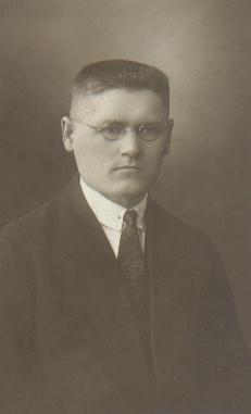 Jonas Kriščiūnas (1888 m. sausio 5 d. Stebuliškėse, Liudvinavo valsčius, Marijampolės apskritis, Rusijos imperija – 1973 m. liepos 2 d. Kaune) – Lietuvos agronomas, bitininkas, politinis bei visuomenės veikėjas.